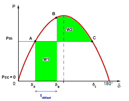 Générateur électrique synchrone en cas de court circuit électrique.